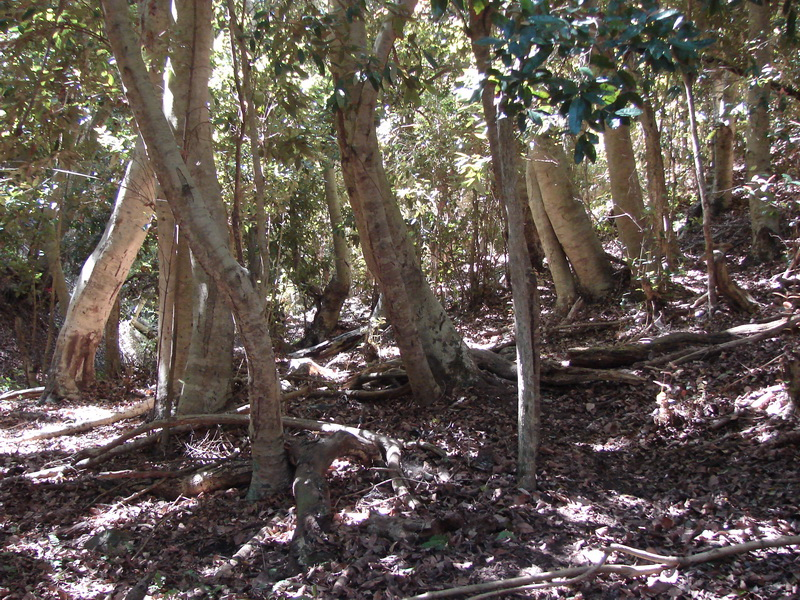 Aextoxicon punctatum en la subida al Cerro Santa Inés, límite entre la IV y V Región